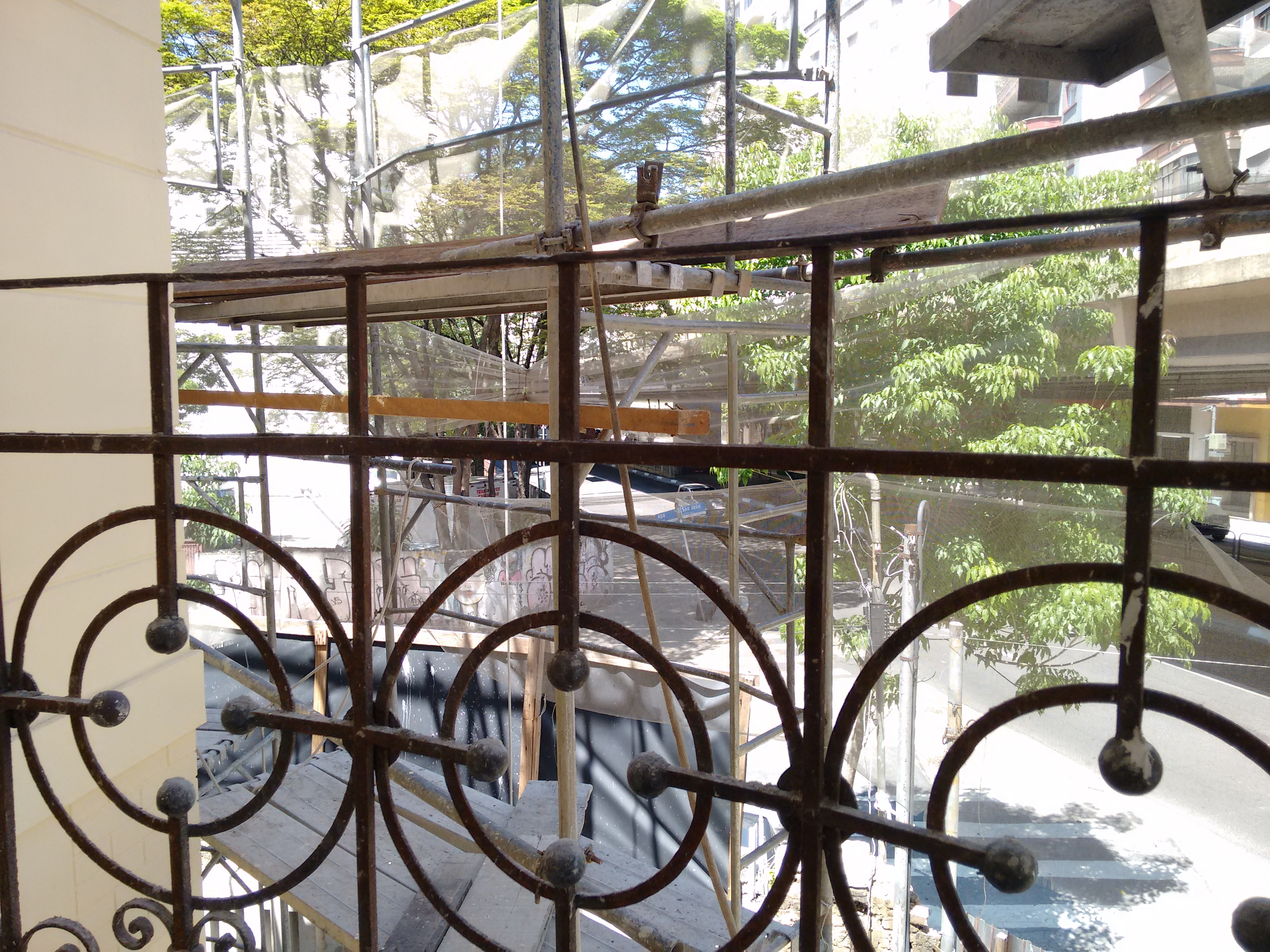 Vista da sacada frontal do Castelinho da Rua Apa em processo de restauro, São Paulo (SP), Brasil